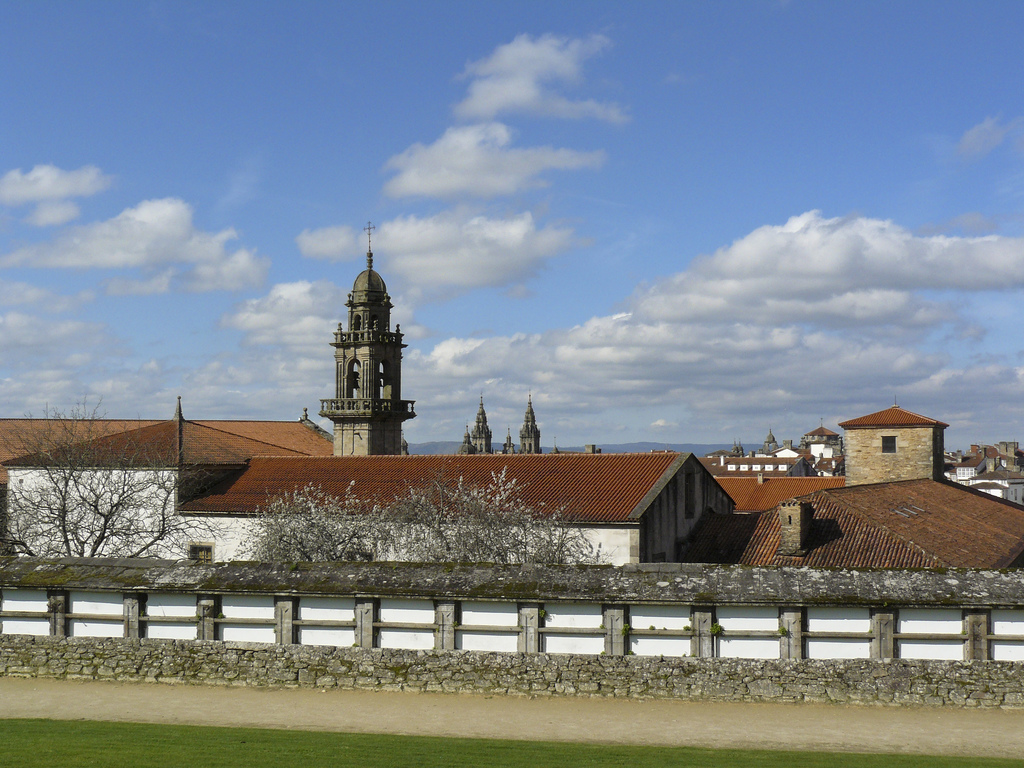 Mosteiro de San Domingos de Bonaval - Santiago de Compostela